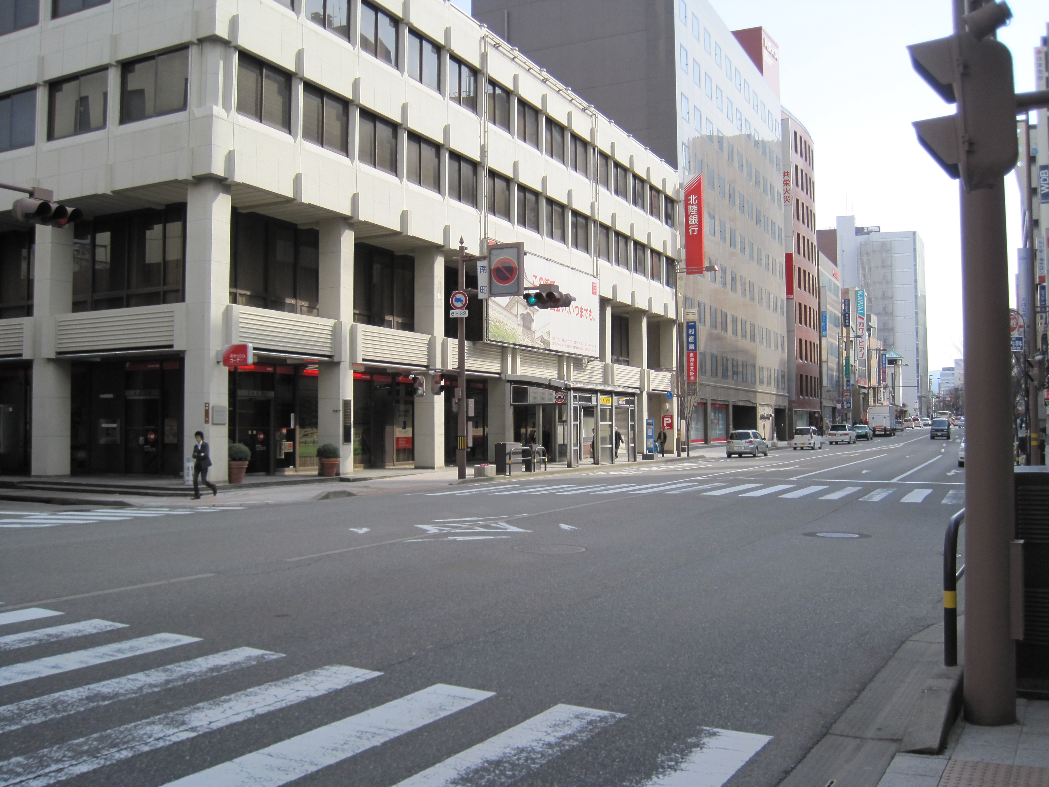 石川県金沢市の南町交差点